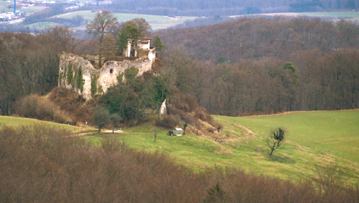 Lage der Burg Neu-Schauenburg, Frenkendorf